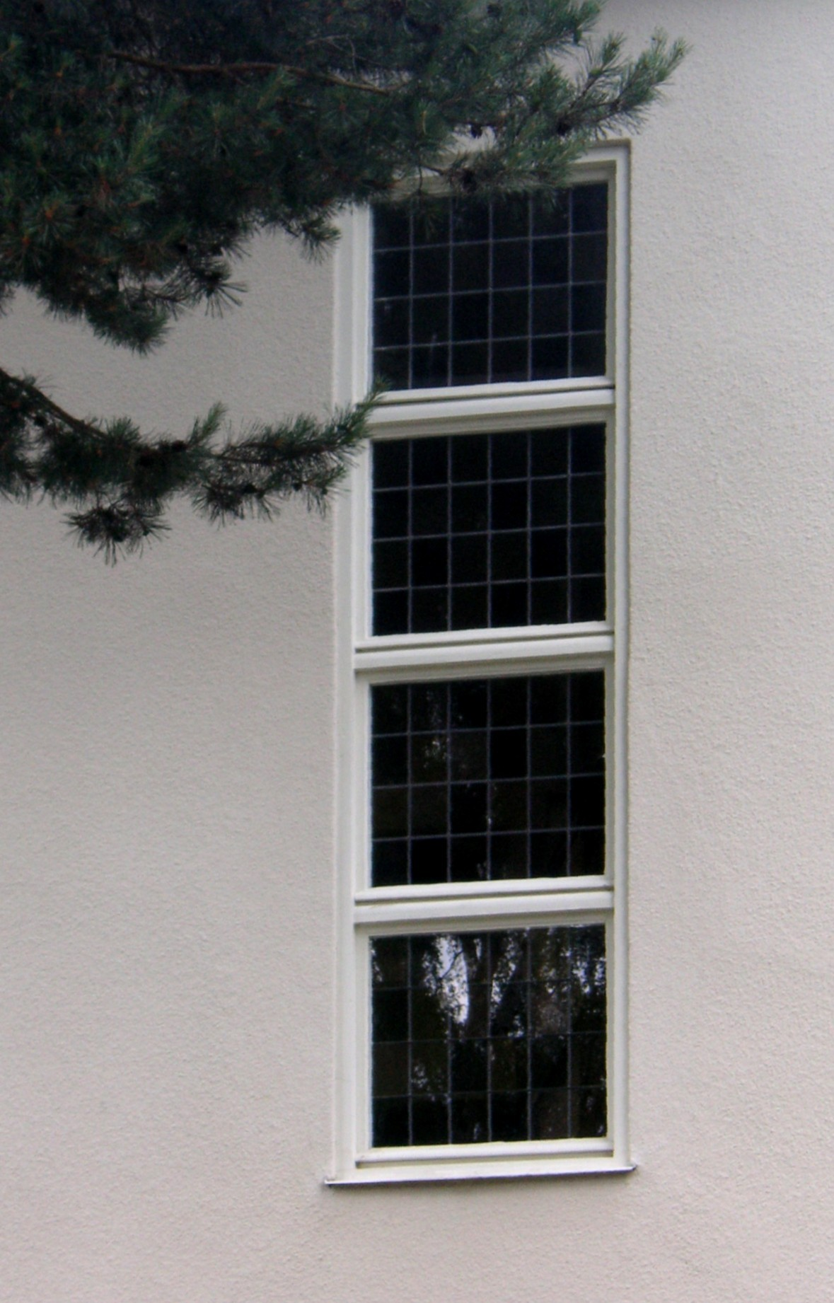 Södra Ängby, Martinvägen 3, Bromma, Stockholm